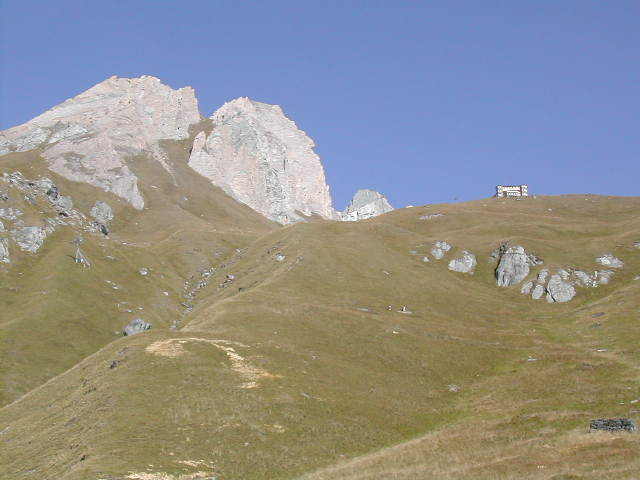 Blick auf die Rote Säule mit Sajathütte